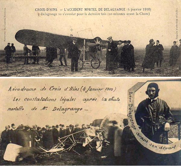 Accident mortel de Léon Delagrange. Photos avant le décollage et après l'accident.